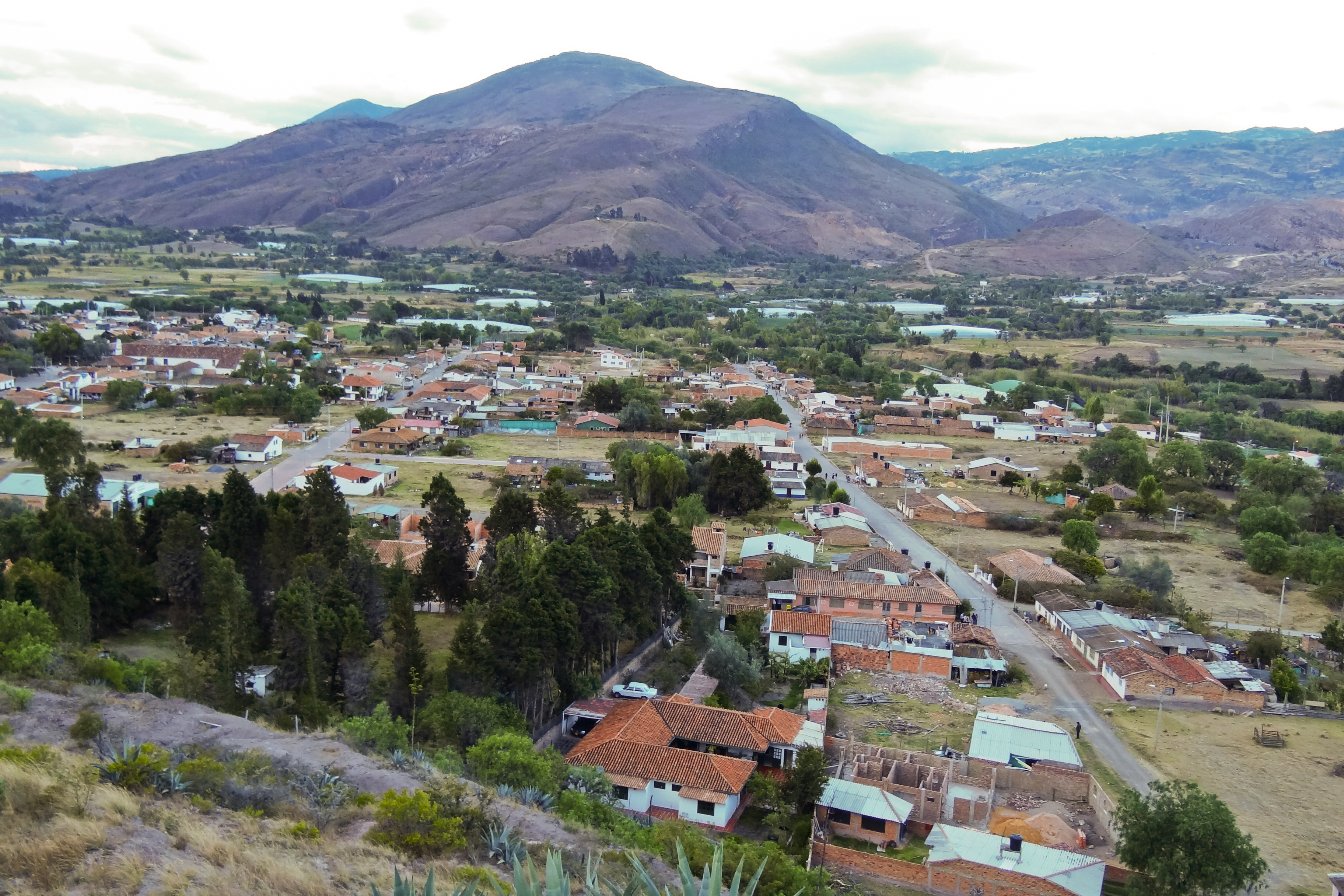 Panorámica de Sáchica, departamento de Boyacá, Colombia. Desde el cerro el Calvario.